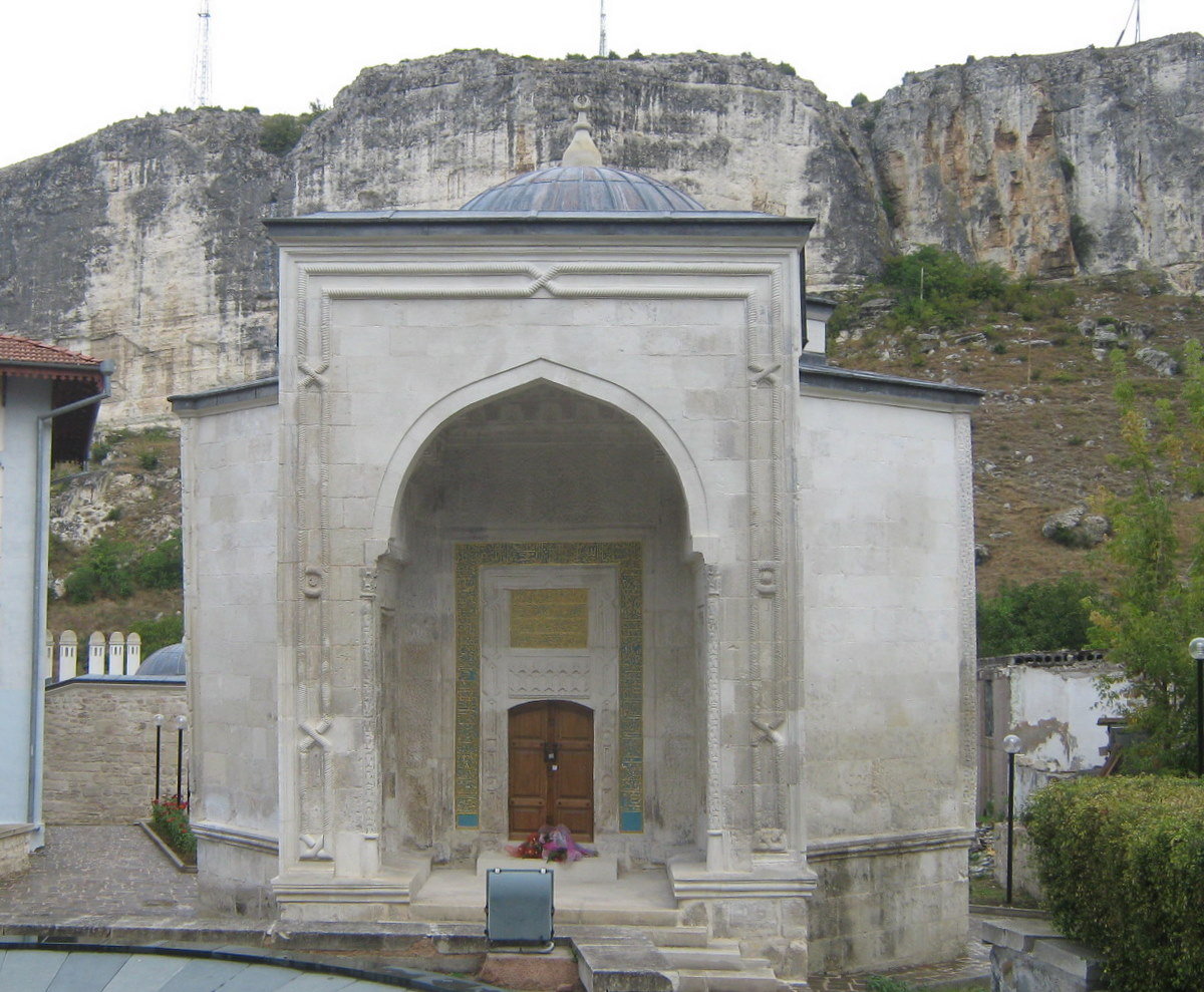 Мавзолей Хаджі Герая